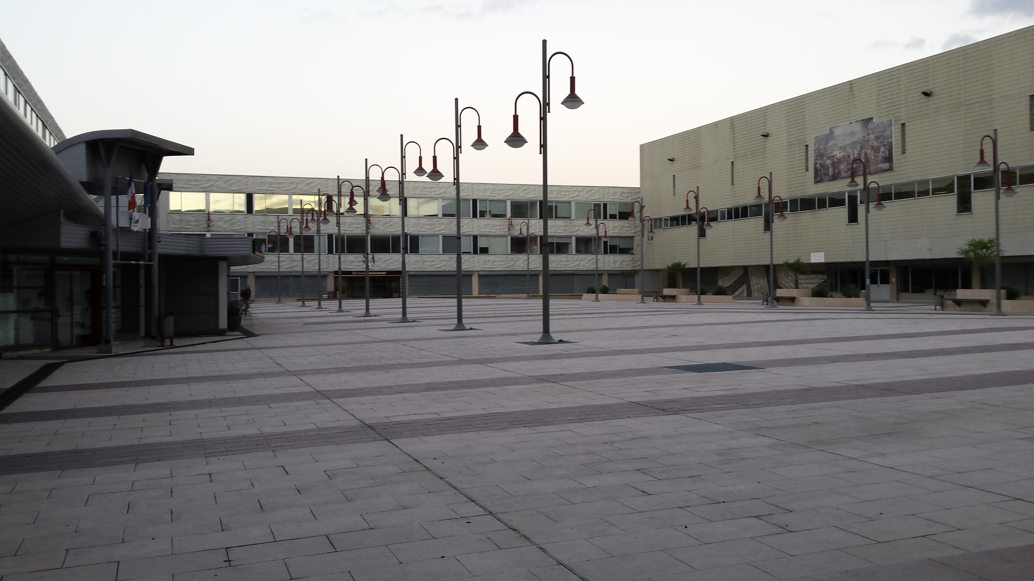 Forum de l'Université Lille III-Charles-de-Gaulle, au soir du 20 octobre 2014.